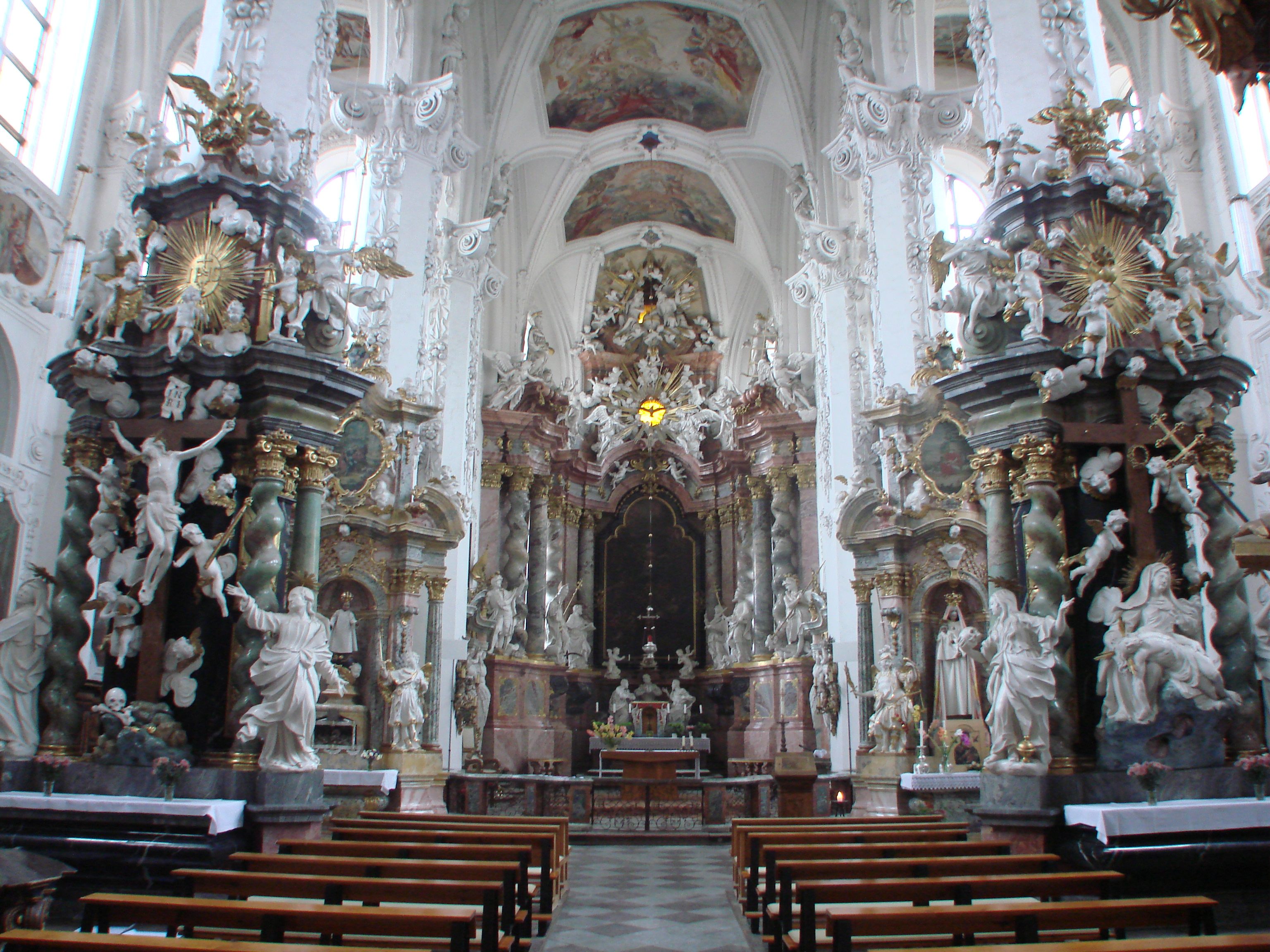 Neuzelle Klosterkirche